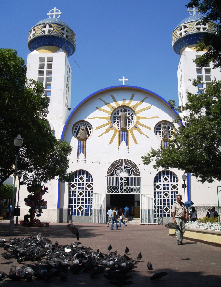 Catedral de Nuestra Señora de la Soledad en Acapulco, Guerrero, México.